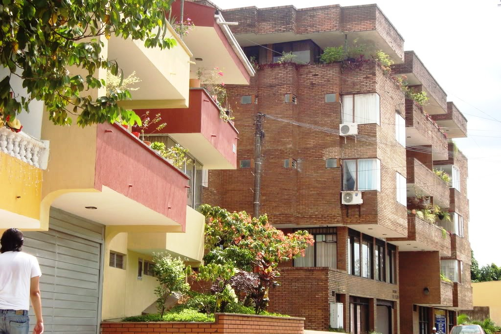 Zona residencial del Barrio El Prado en Florencia, Caquetá, Colombia